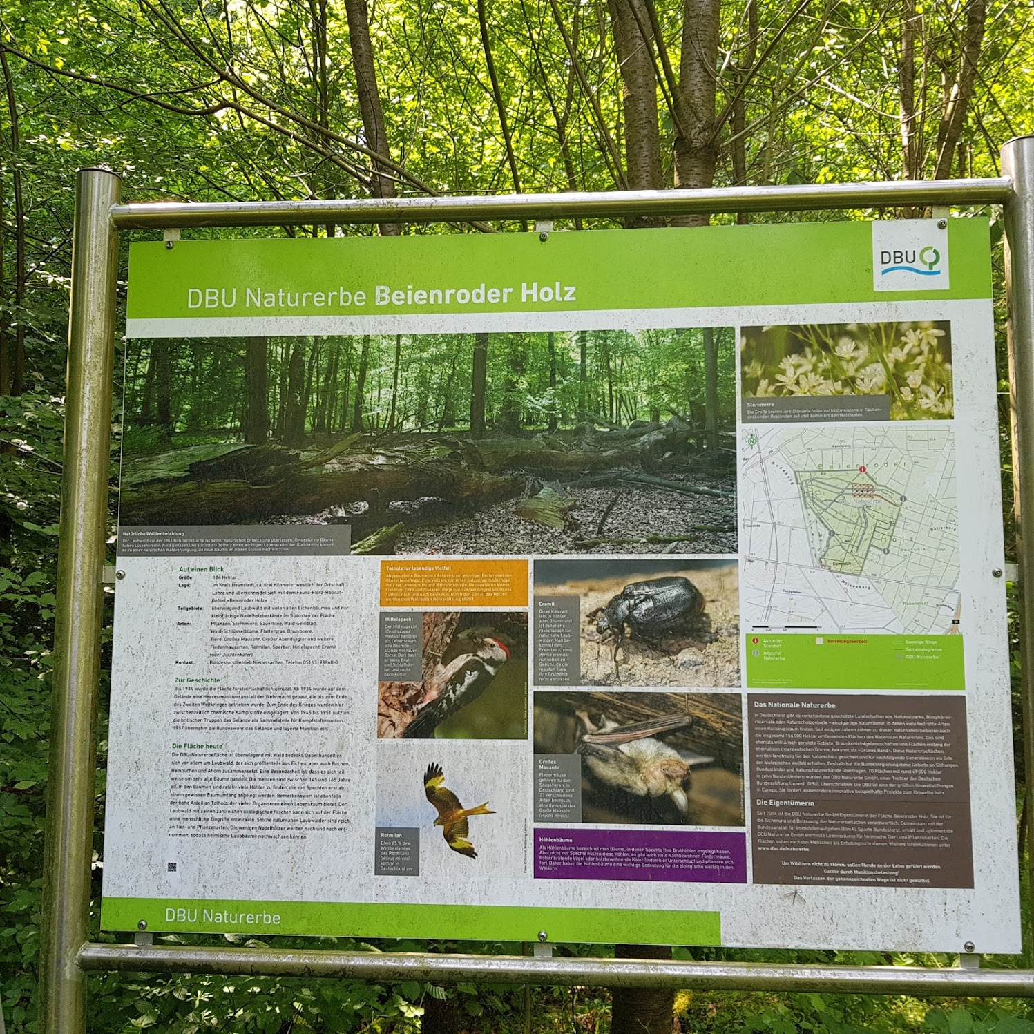 Informationstafel des DBU im Naturerbe Beienroder Holz